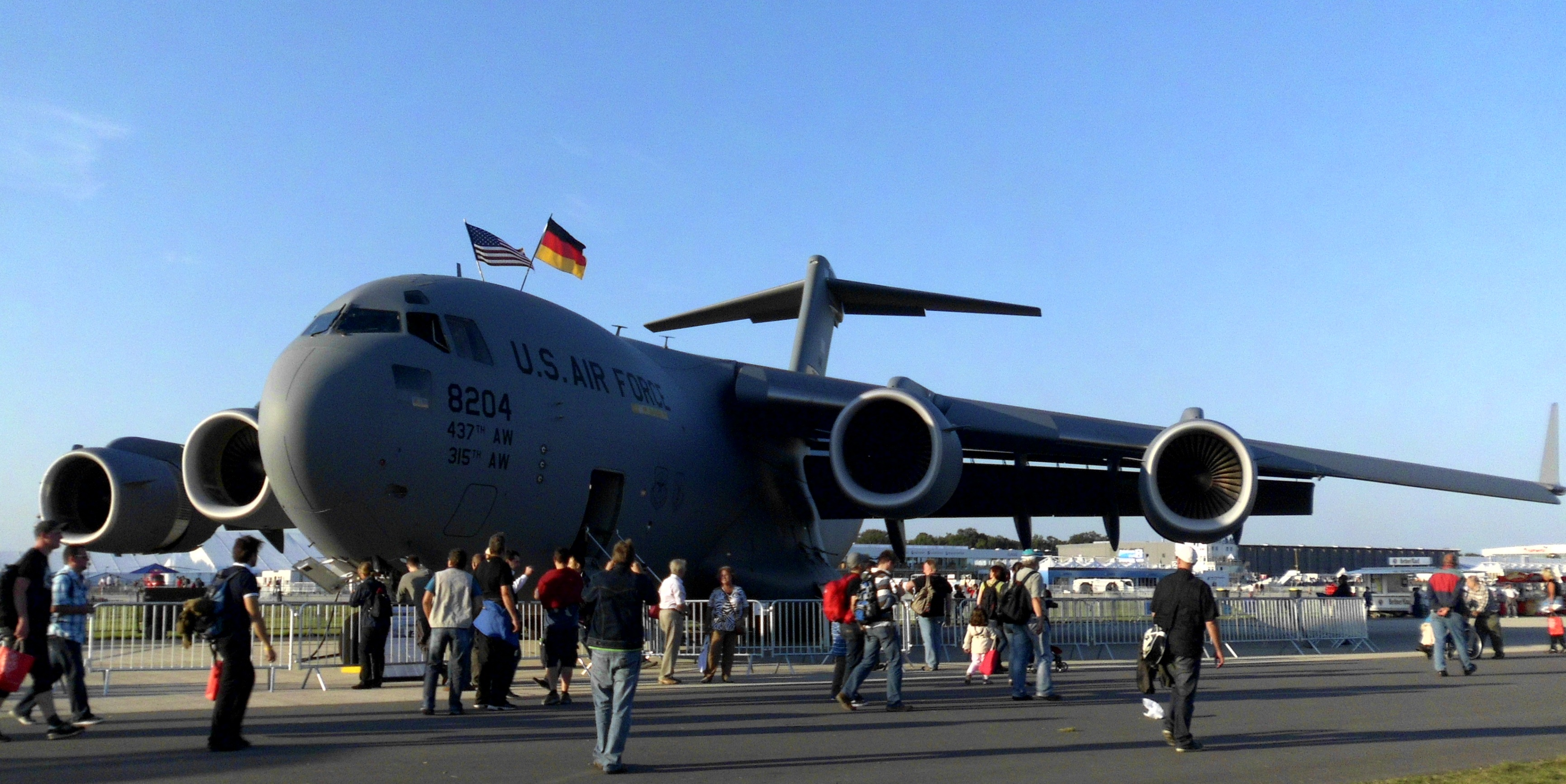 Die C-17A Globemaster III auf der ILA 2012 (Reg. 08-8204, US Air Force).